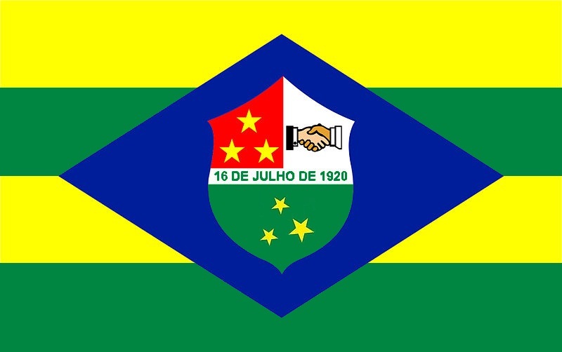 Bandeira do município Trindade, Goiás.